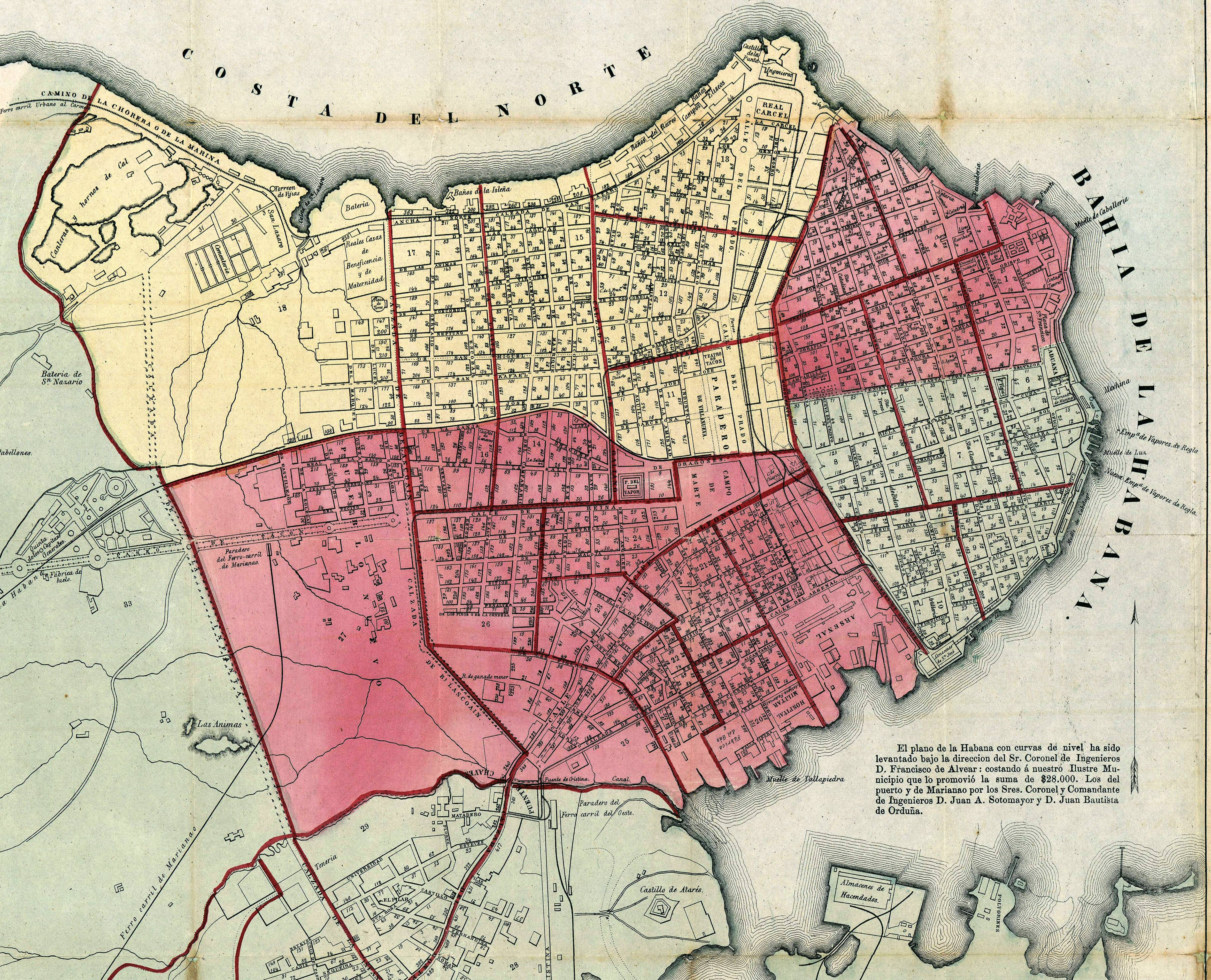 Ciudad de San Cristóbal de La Habana. Fragmento del Plano de La Habana : Con los números de las casas y la division civil, judicial, eclesiástica y de instruccion pública y los planos particulares del puerto, Regla, Guanabacoa, Marianao y cercanías de la Habana Formado con vista de los magníficos planos de la capital, del puerto y de Marianao y los Quemados, levantados en 1861 64, por distinguidos ingenieros. En el lateral derecho figura la nota: "El plano de la Habana con curvas de nivel ha sido levantado bajo la direccion del Sr. Coronel de Ingenieros D. Francisco Alvear".